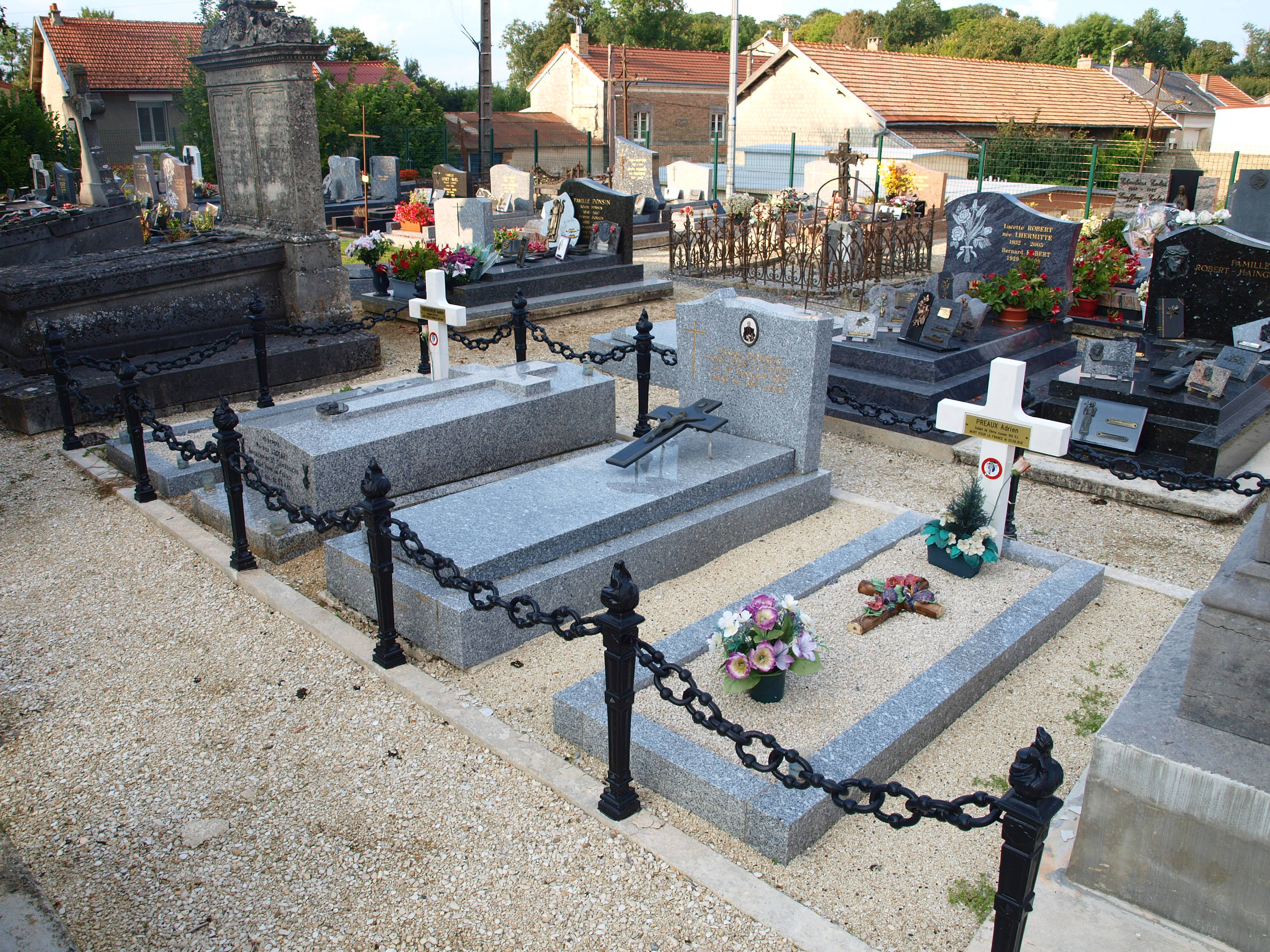 Aussonce (Ardennes, France) ; sépulture militaire